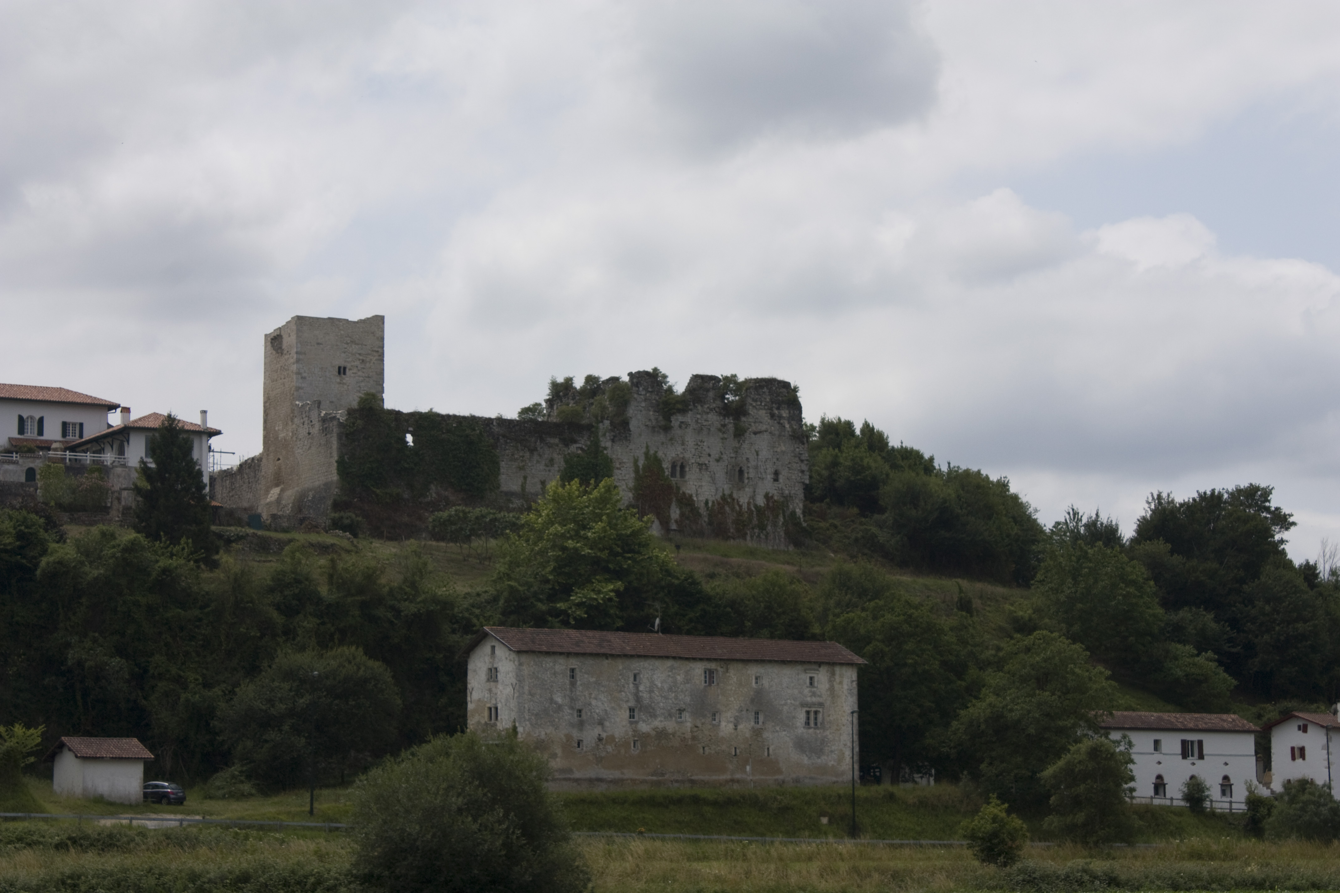 Château des Ducs de Gramont, a l'extrémité ouest du village